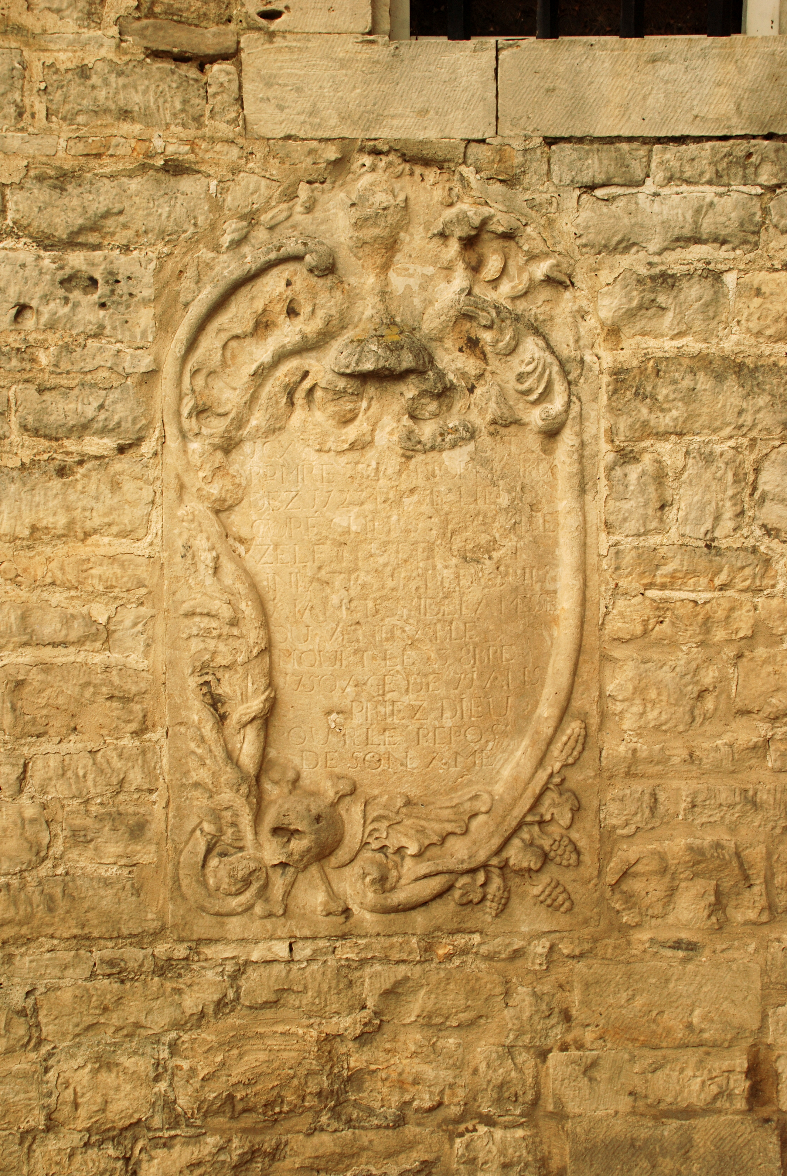 Belgique - Brabant wallon - Jodoigne - Saint-Remy-Geest - Église Saint-Remy